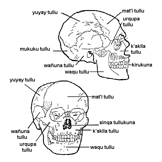 Runa Simi: Runap uma tullun